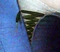 Шнуровка корсета. Фрагмент картины "Богоматерь с младенцем" Жана Фуке, 1452